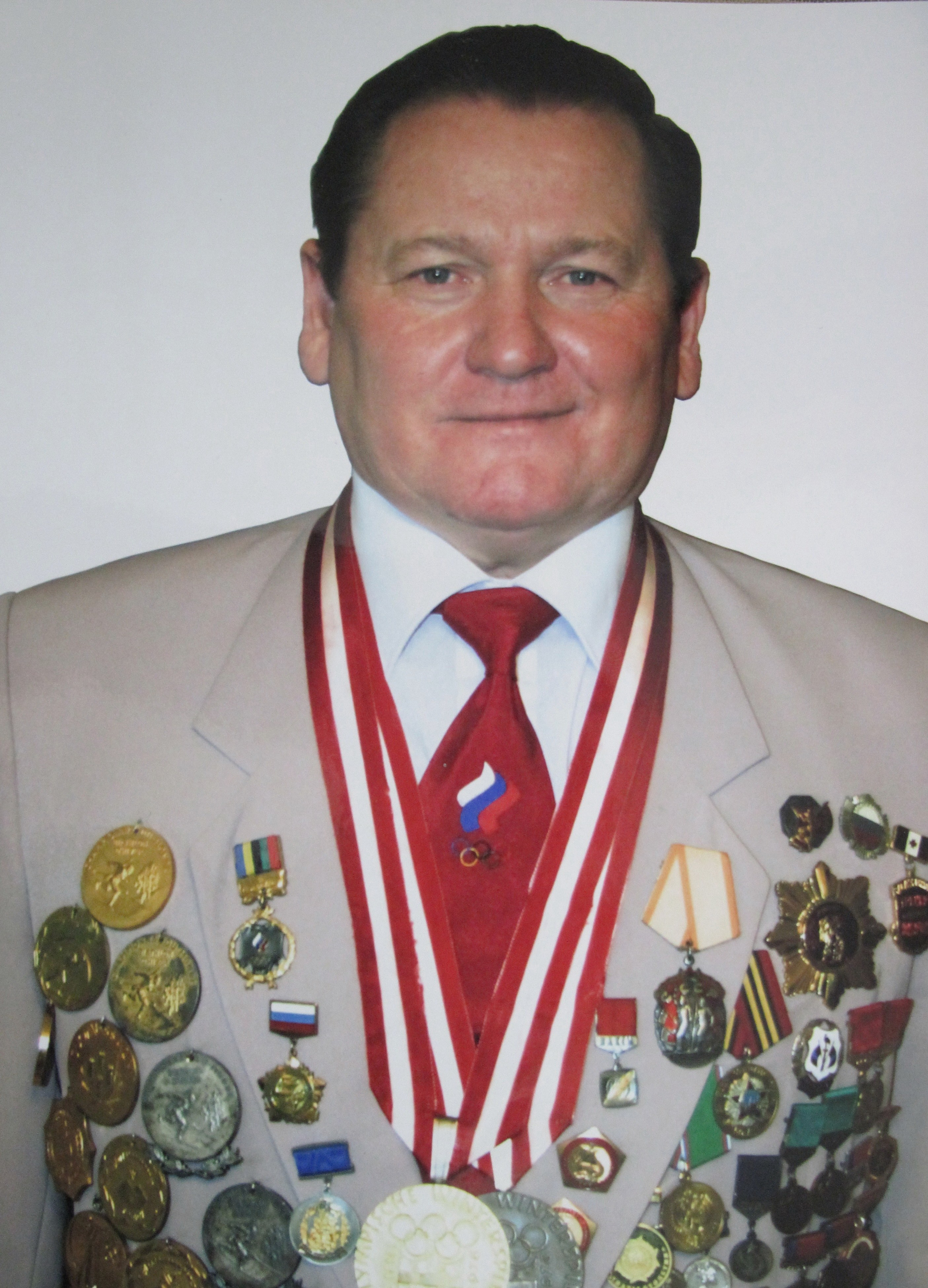 Aleksandr Matveyevich Yelizarov